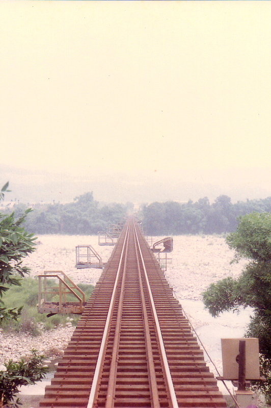 中文（台灣）: 東勢線大甲溪橋